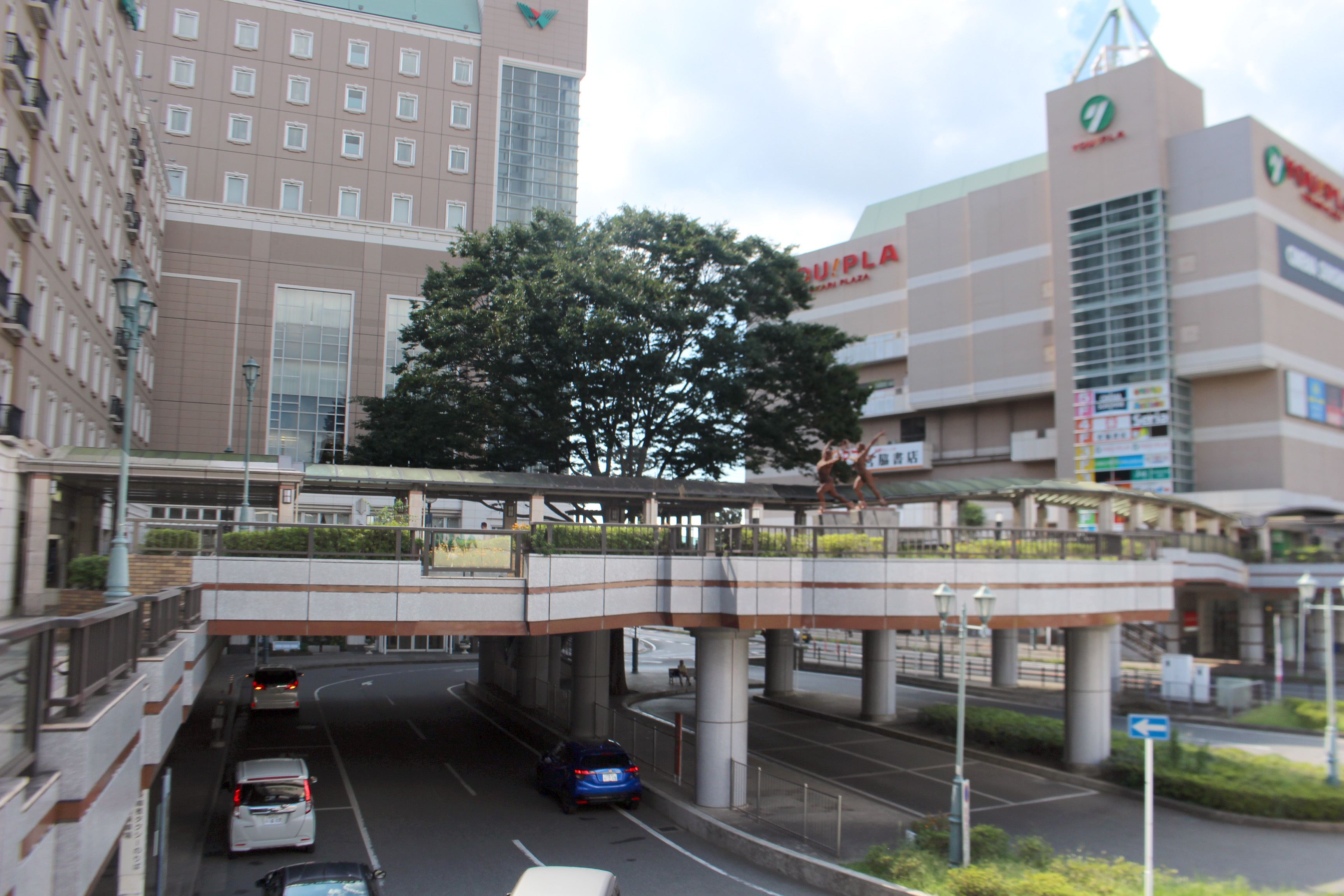 ユーカリが丘駅北口のペデストリアンデッキ